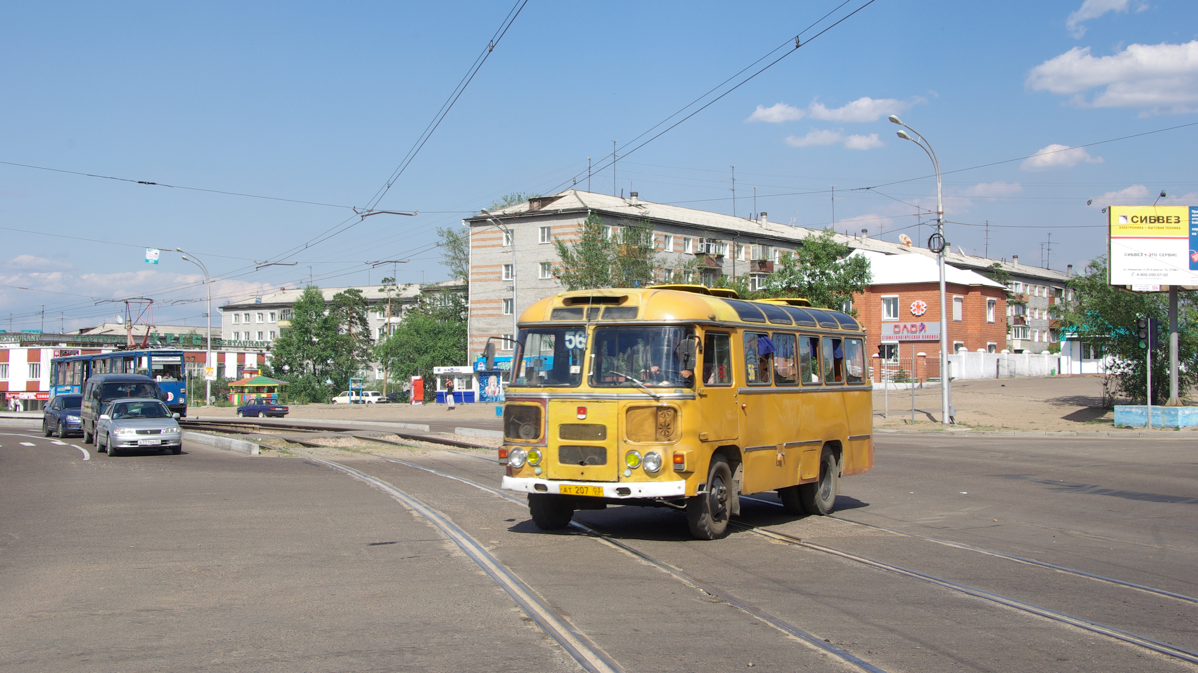 Автобус Улан-Удэ ПАЗ-672М